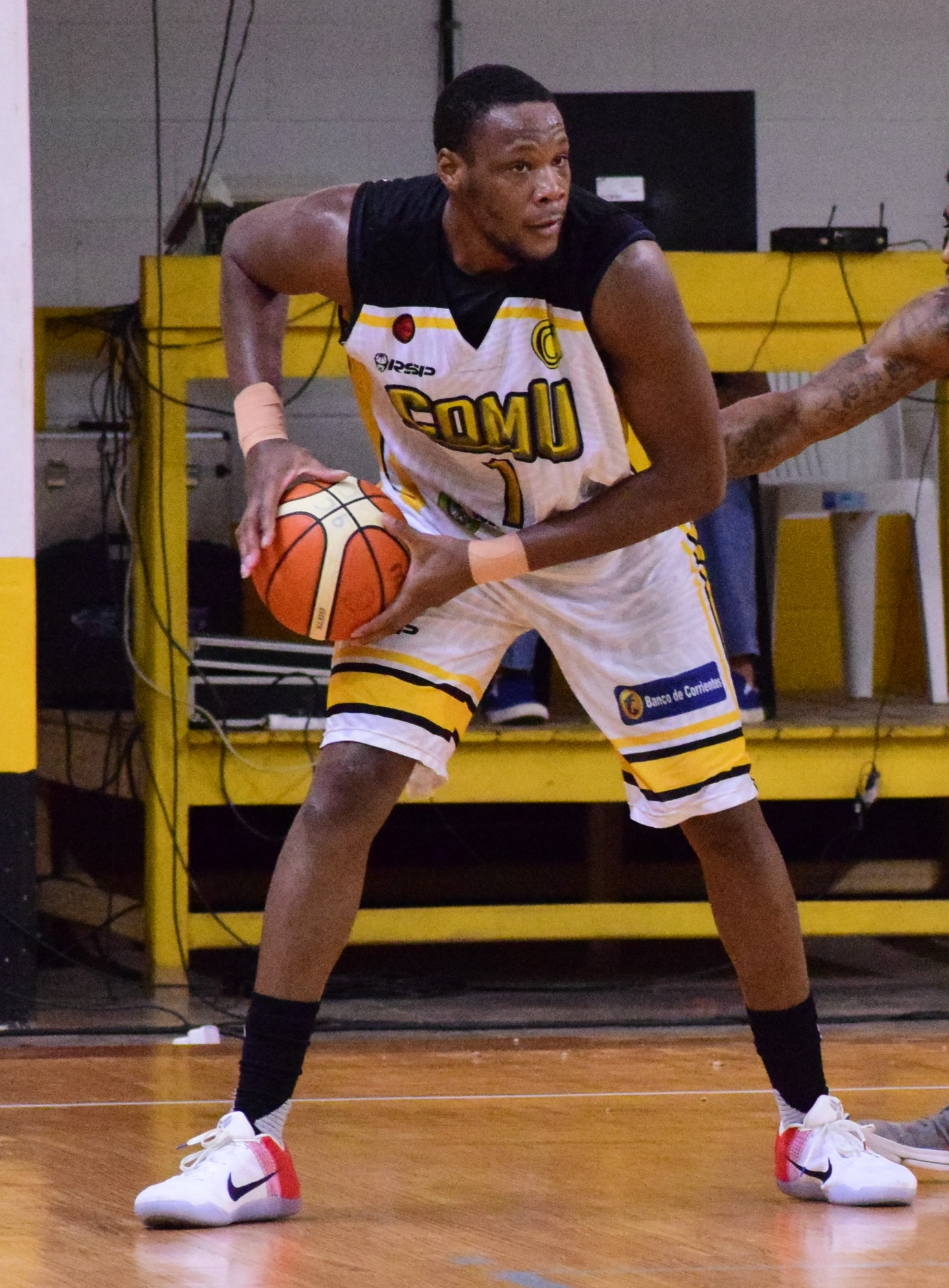 Jugando en Comunicaciones de Mercedes Corrientes Argentina